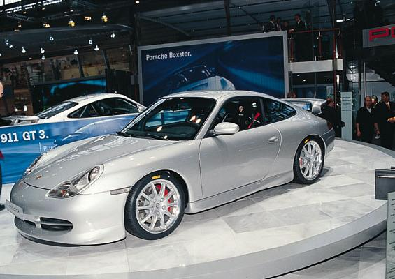 Porsche 911 GT3 Type 996 silver Geneve 1999Porsche 911 GT3 Type 996 silver Geneve 1999